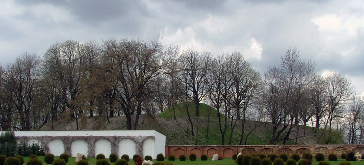 Chełm - Wysoka Górka